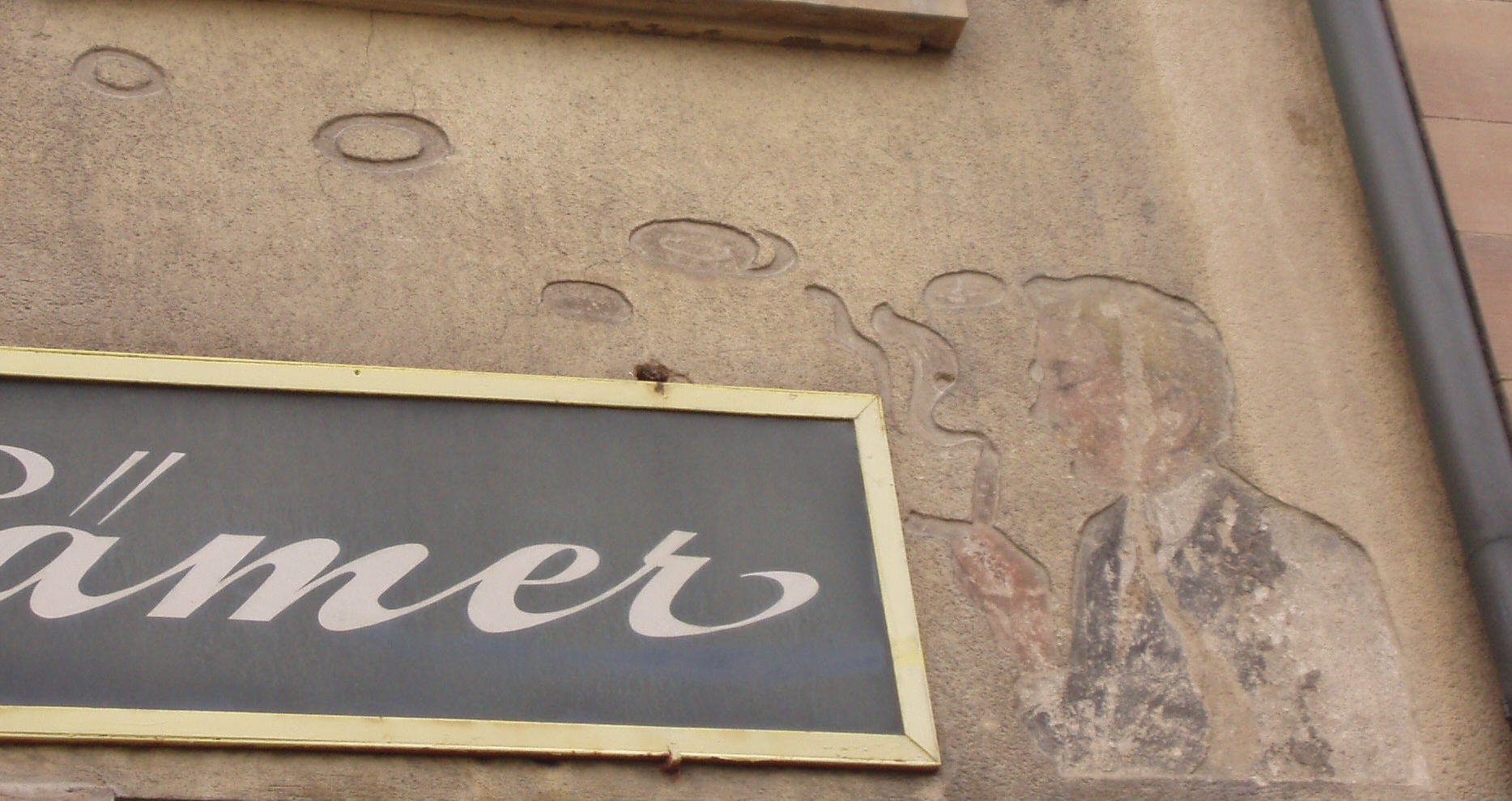 alter Hinweis auf ein Tabakwarengeschäft von 1909